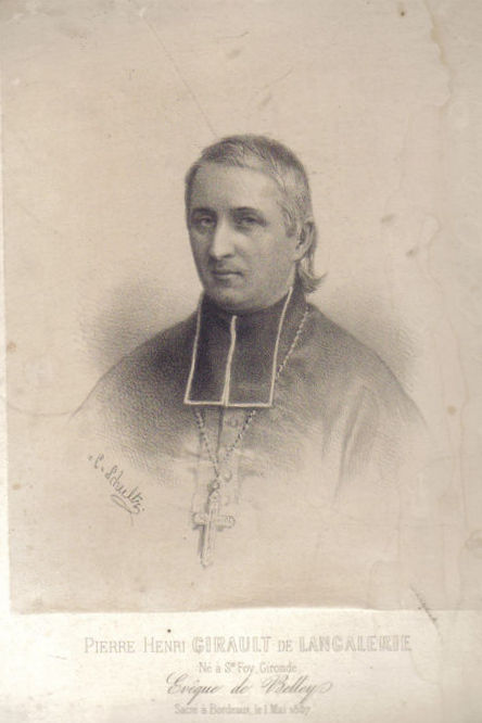 Pierre-Henri Gérault de Langalerie, évêque de Belley puis archevêque d'Auch.